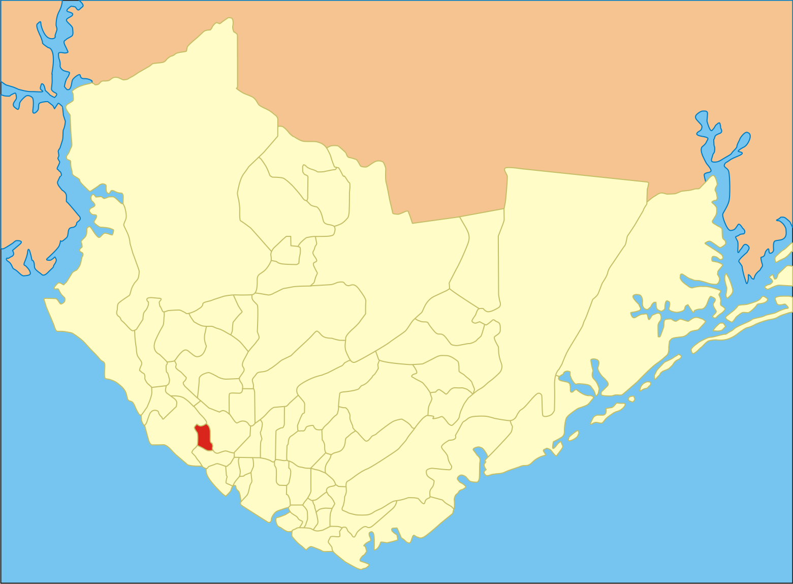 Localização do bairro em Manaus